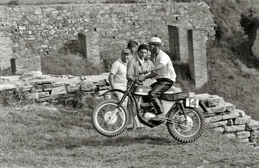 Título original: Competición de motocros en la zona de Aiete y Antiguo (5/30) Localización: San Sebastián (Guipúzcoa)